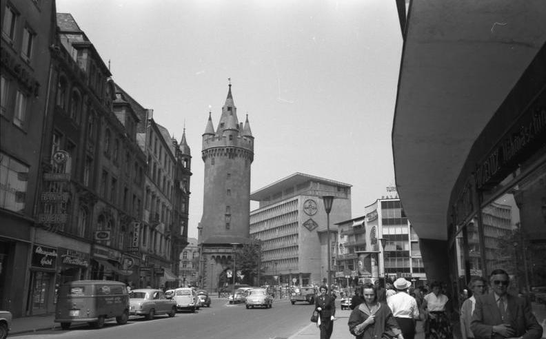 Stadtaufnahmen in Frankfurt/Main Eschenheimer Turm Information added by Wikimedia users.Linke Straßenseite das Pelzgeschäft Albert Lüder, Schriftzug „PELZE“, Große Eschenheimer Straße 41a.